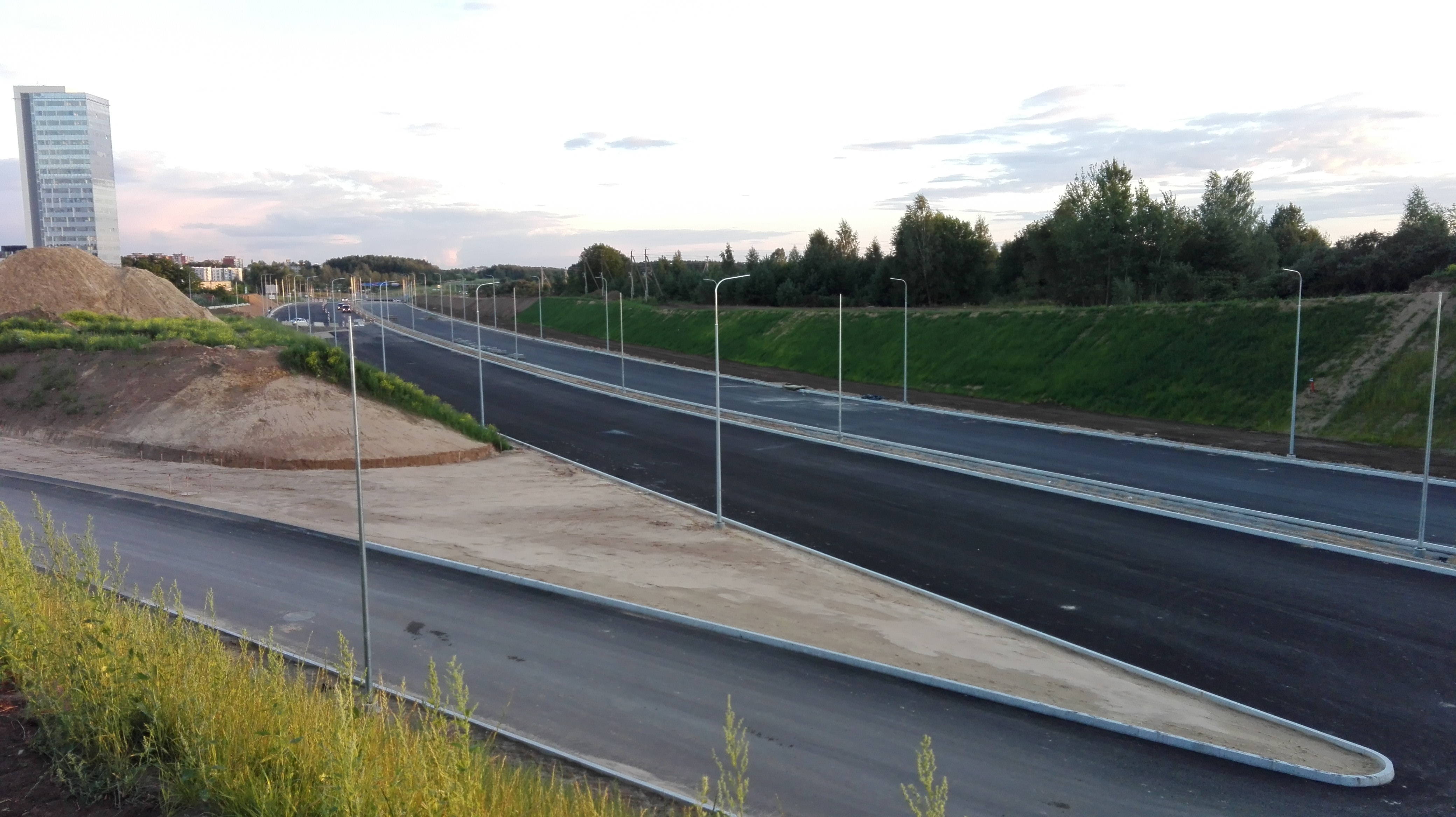 2016 m. rugpjūtis